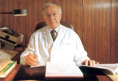 Doctor Miquel Sarrias